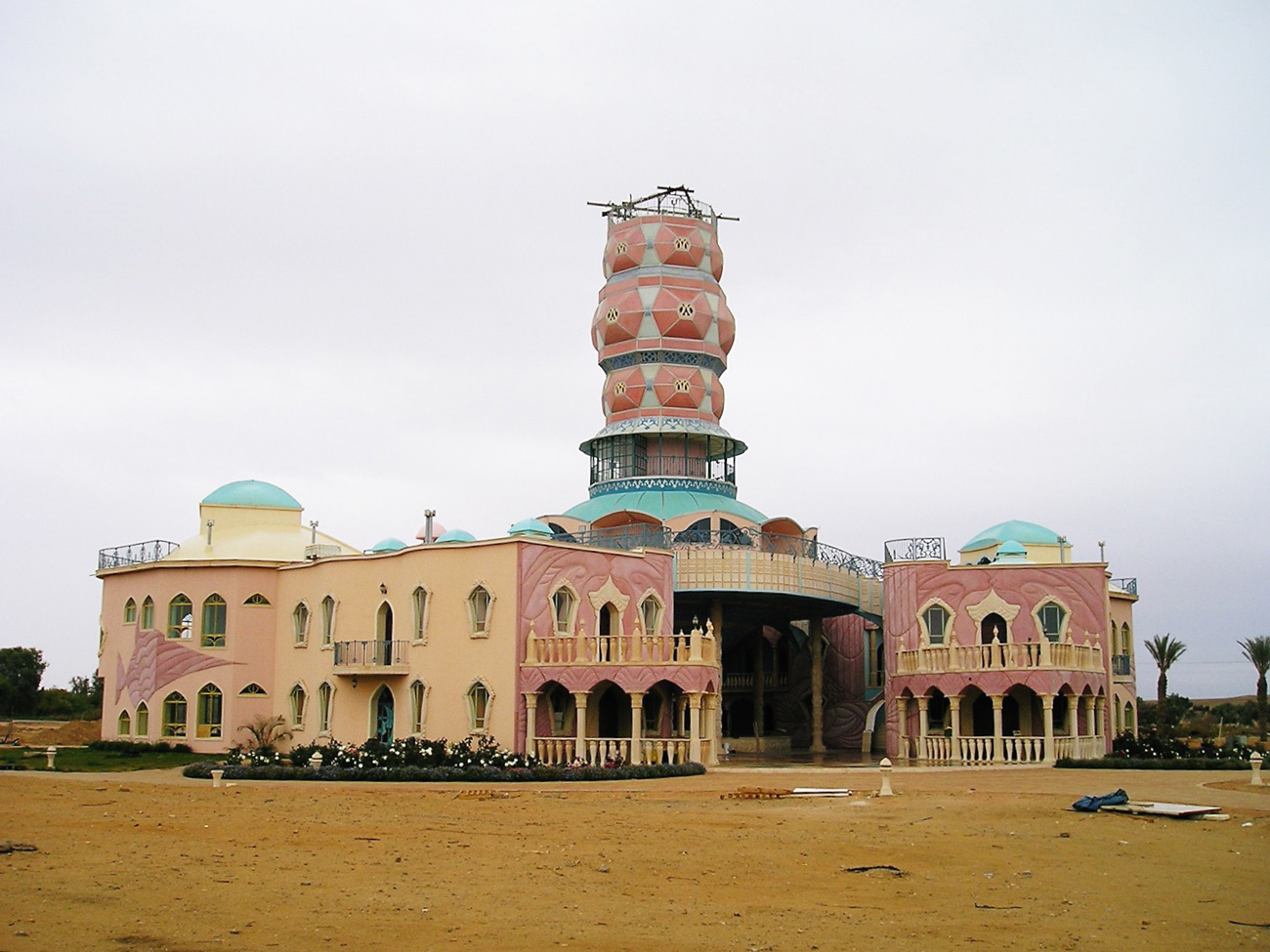 Ansicht des Kulturzentrums von Ne'ot Semadar